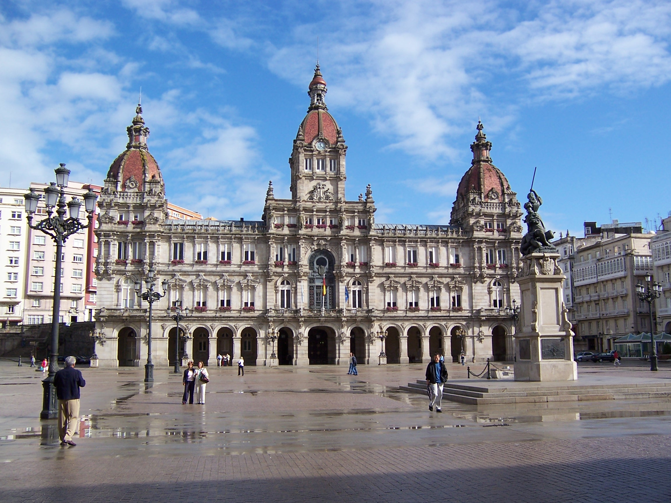 Spain 2004 september KODAK 7440 camera Source: Daniel Csörföly